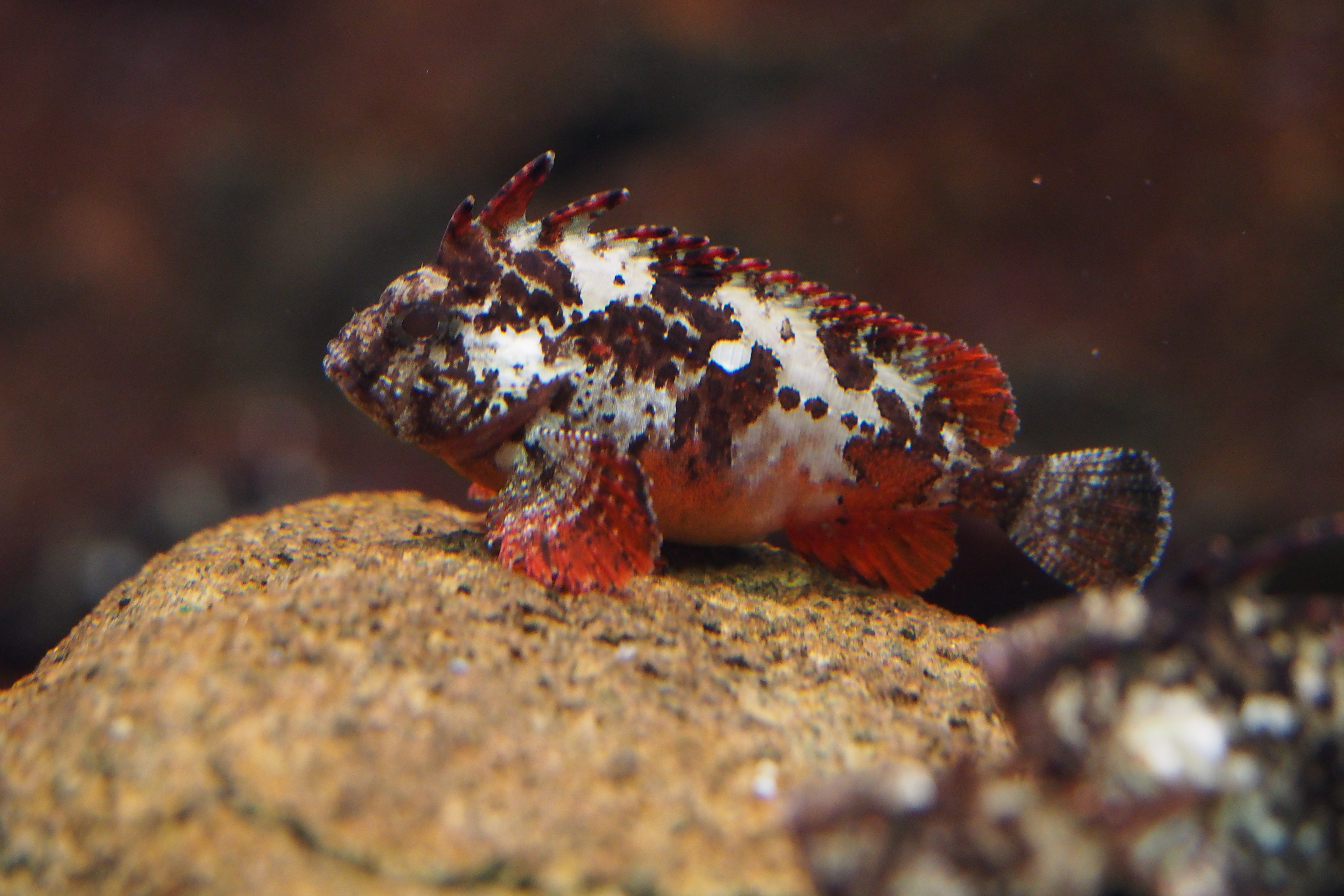 ハオコゼ. at Suma aquarium.